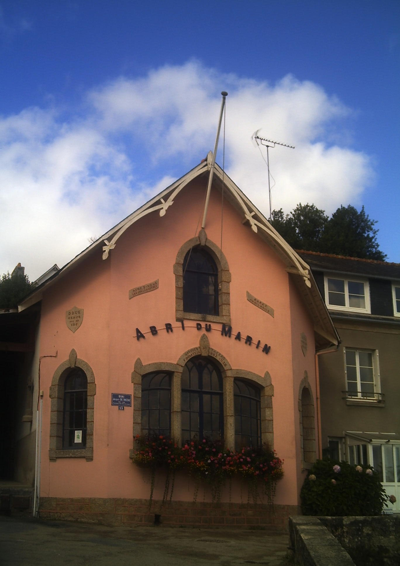 L'Abri du Marin, à Combrit Sainte-Marine, inscrit monument historique